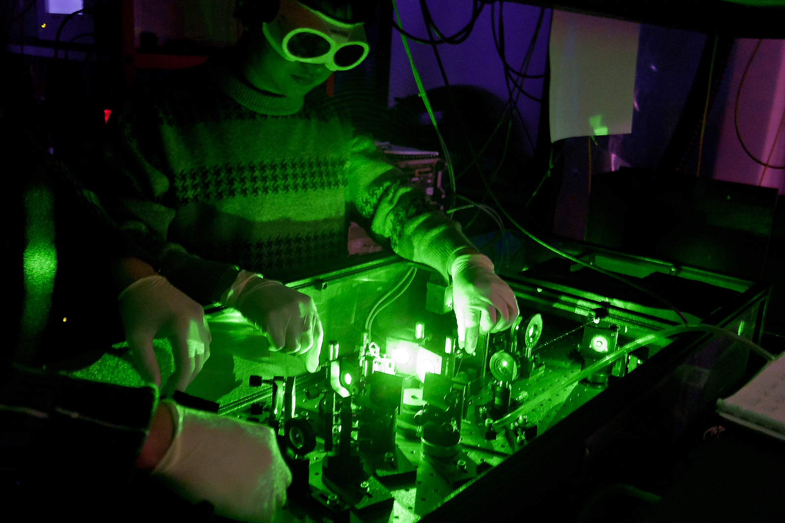 Heinrich-Heine-Universität Düsseldorf, Frequenzverdopplungseinheit von 532 nm auf 266 nm für Laserspektroskopie